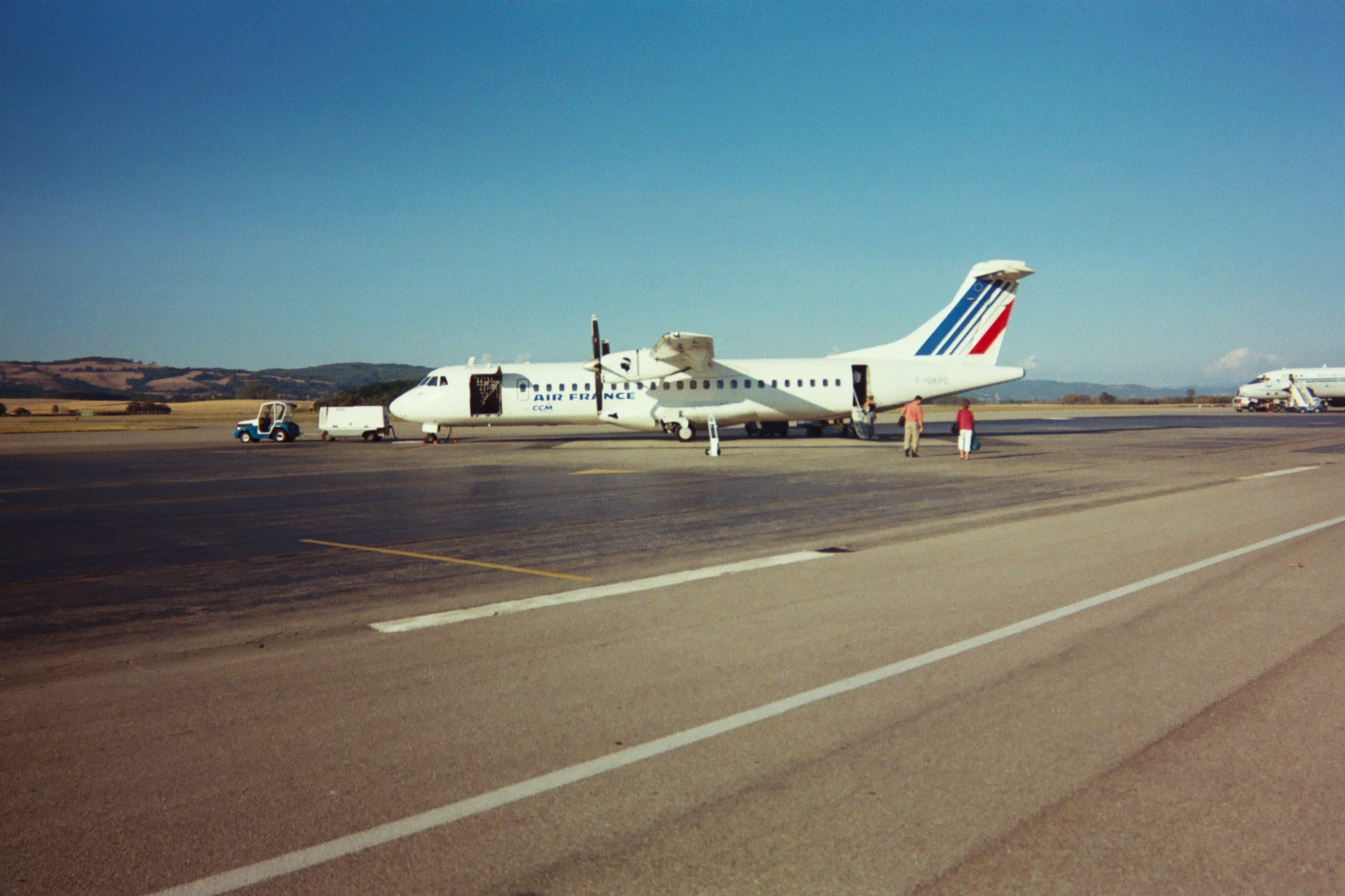 ATR 72 d'Air France (F-GKPC) sur l'aéroport de Grenoble-Saint-Geoirs en aout 2003 (Isère, France)